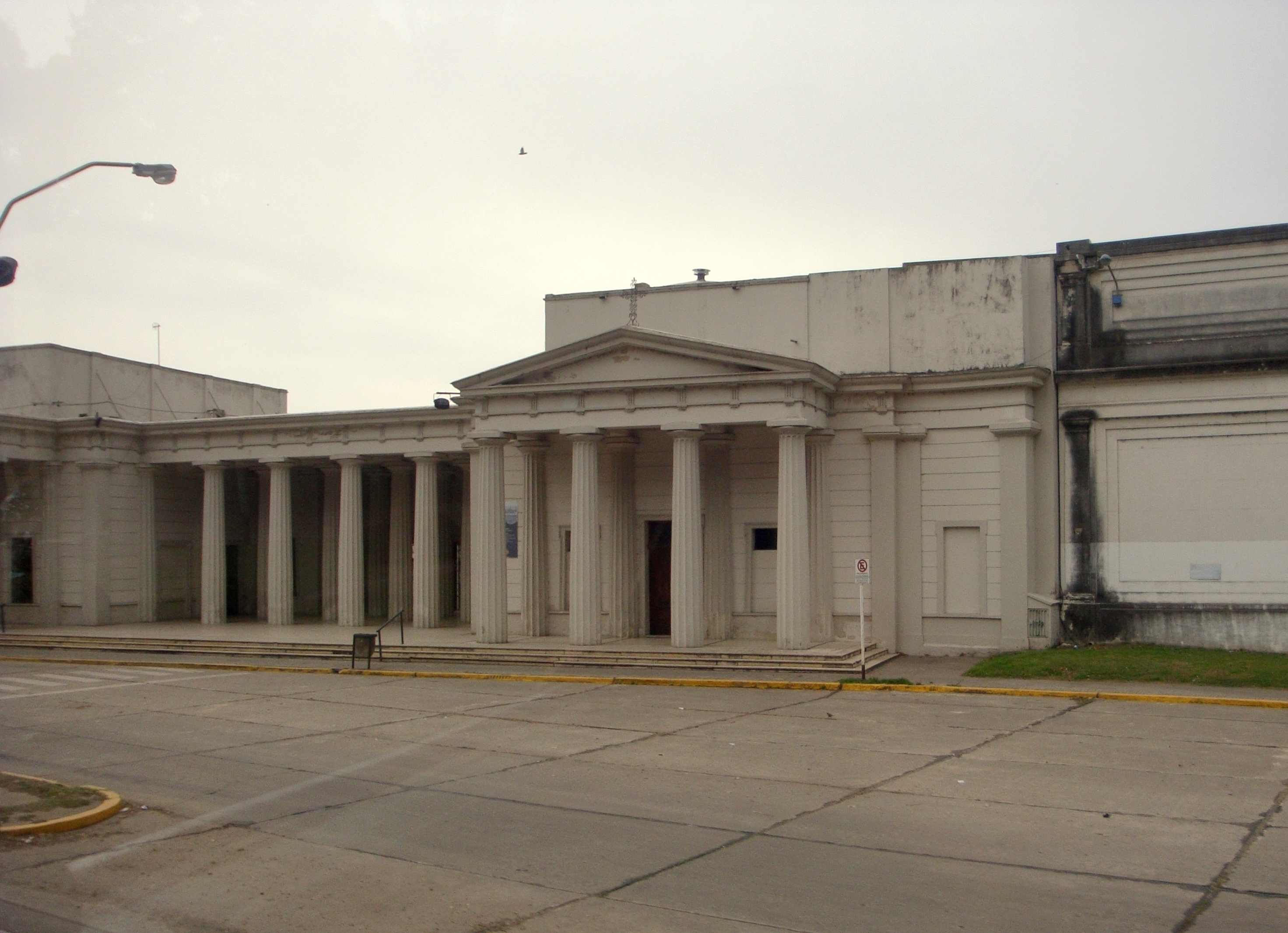 Cementerio El Salvador, Rosario, Argentina.